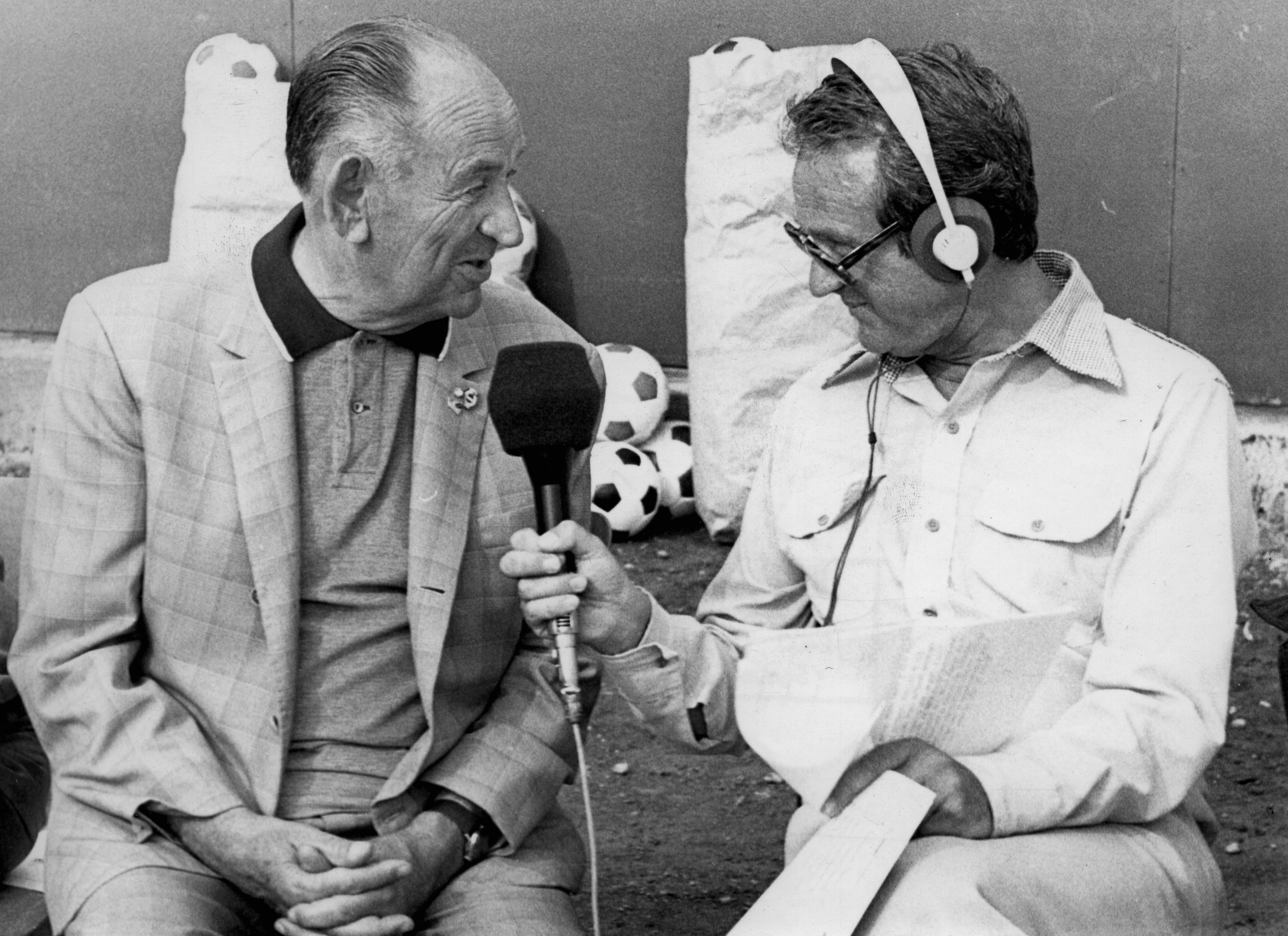 a Magyar Rádió Bácsi kérem, hol lehet itt focizni? című műsora, Bukovi Márton labdarúgó edző és Szepesi György sportriporter. Location: Hungary Tags: Hungarian Radio Title: a Magyar Rádió Bácsi kérem, hol lehet itt focizni? című műsora, Bukovi Márton labdarúgó edző és Szepesi György sportriporter.